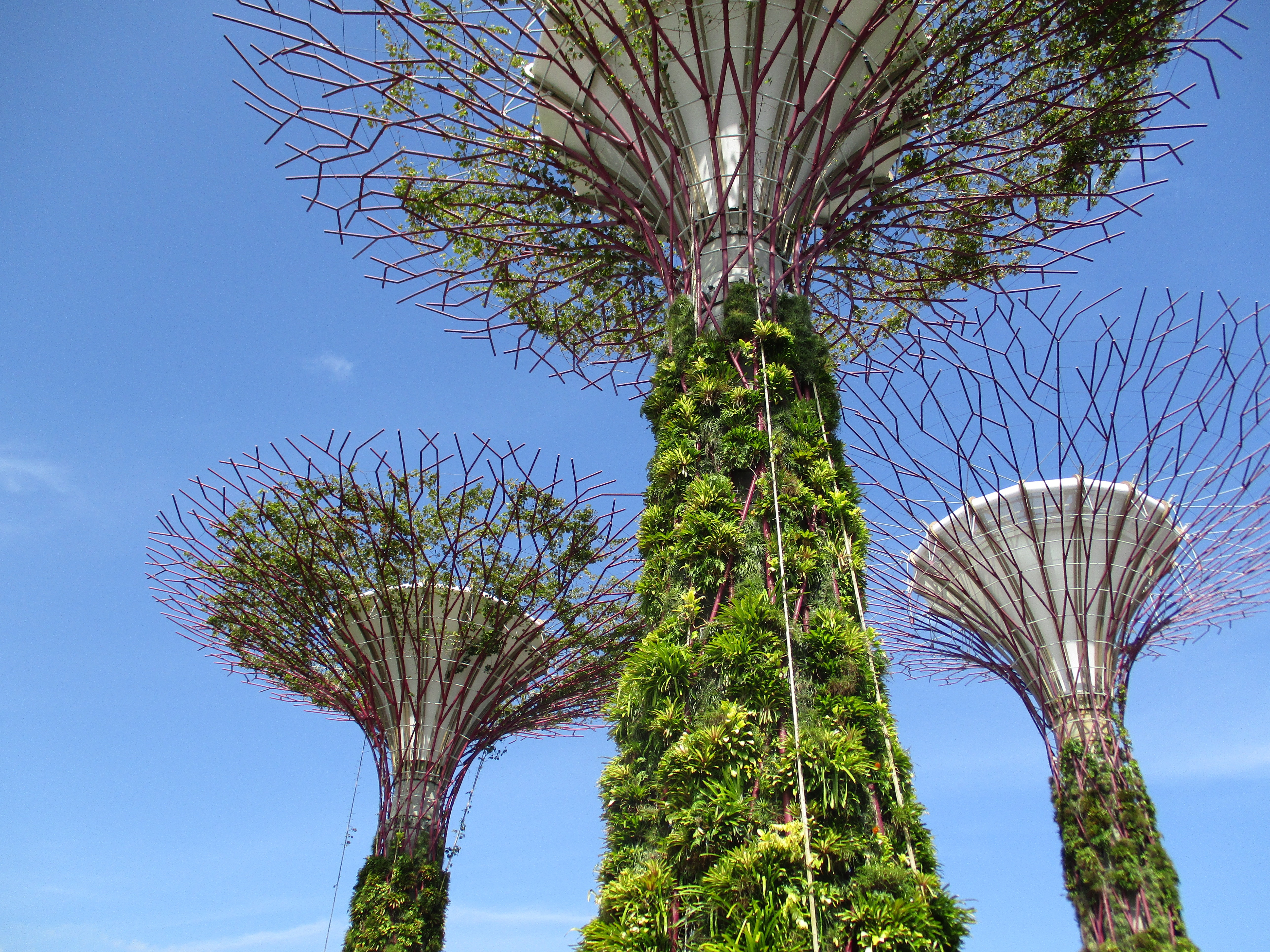 Taman di Dekat Teluk Singapura